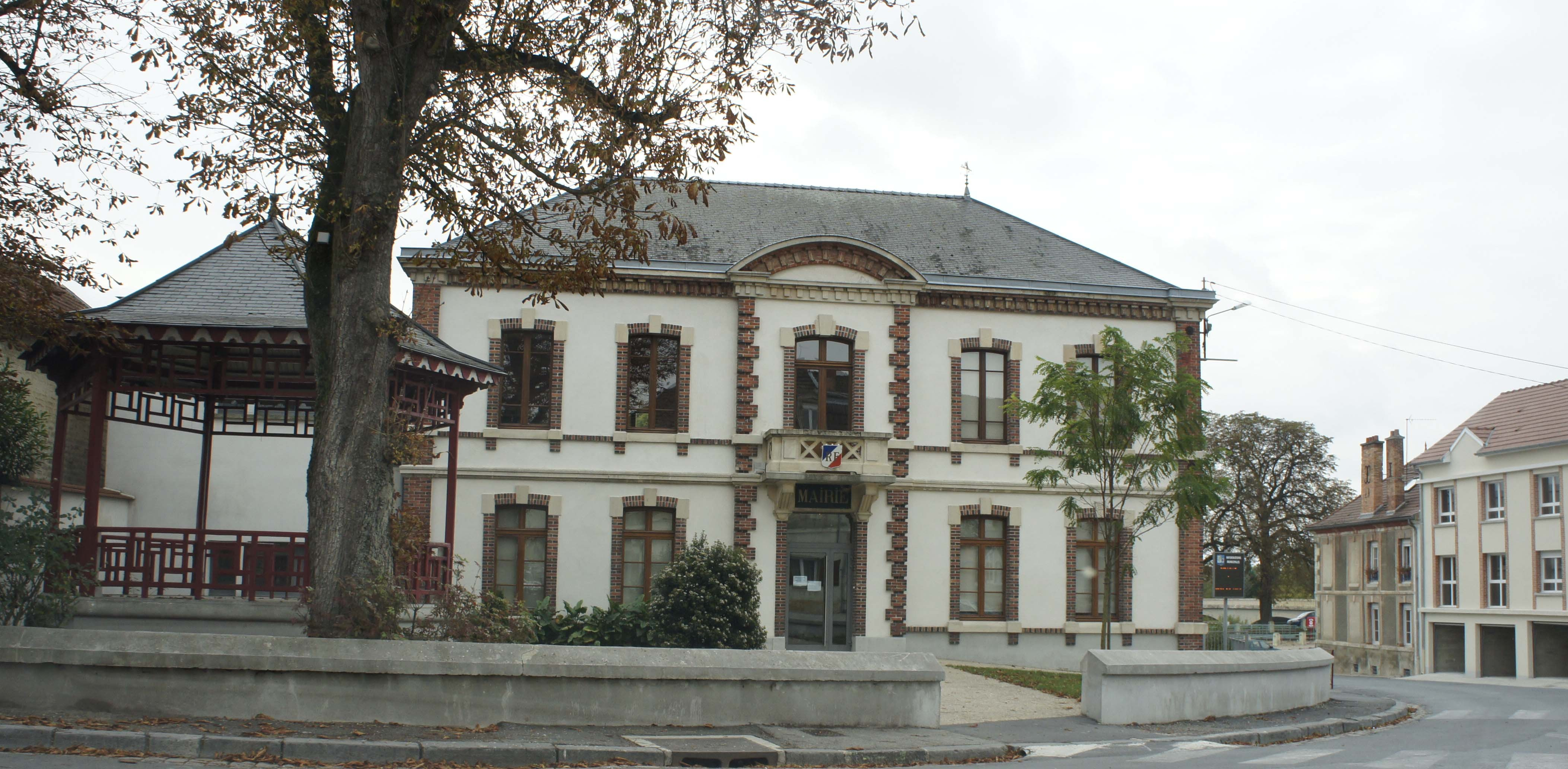 Vue de face de la Mairie Tours sur Marne.